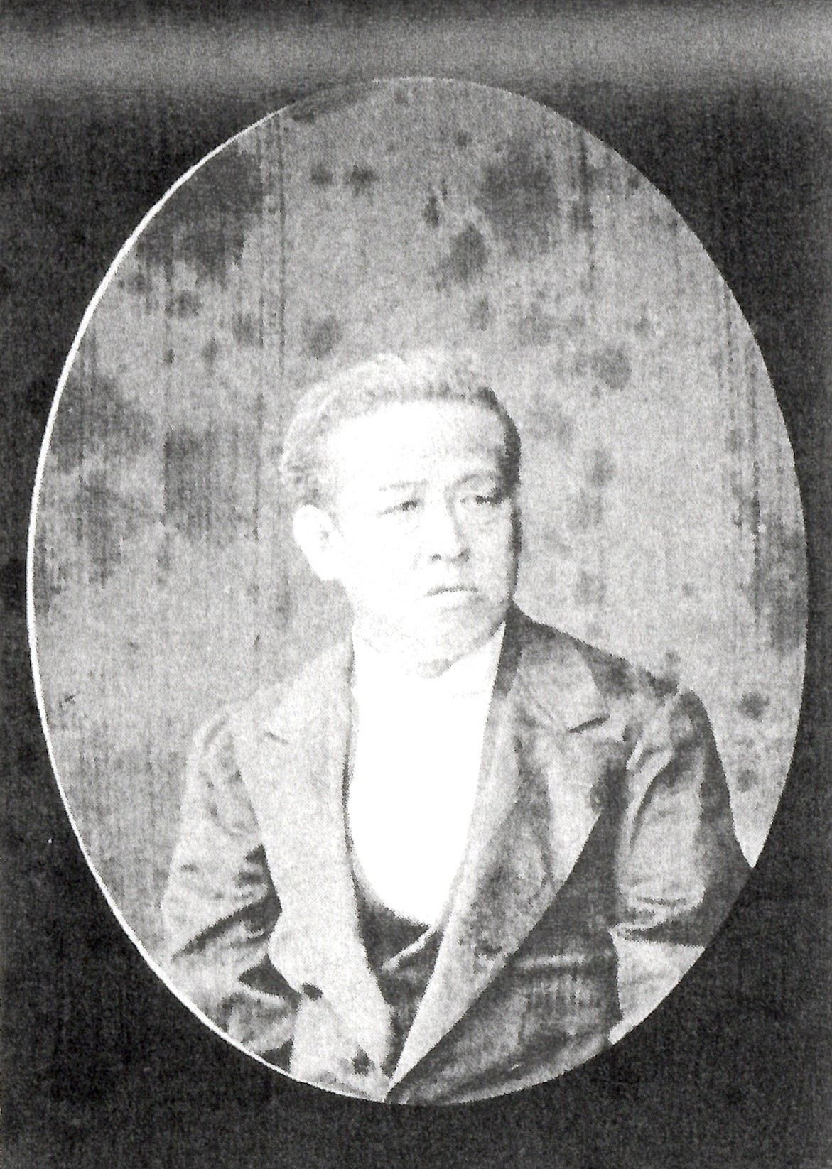 渡辺章綱の肖像写真。